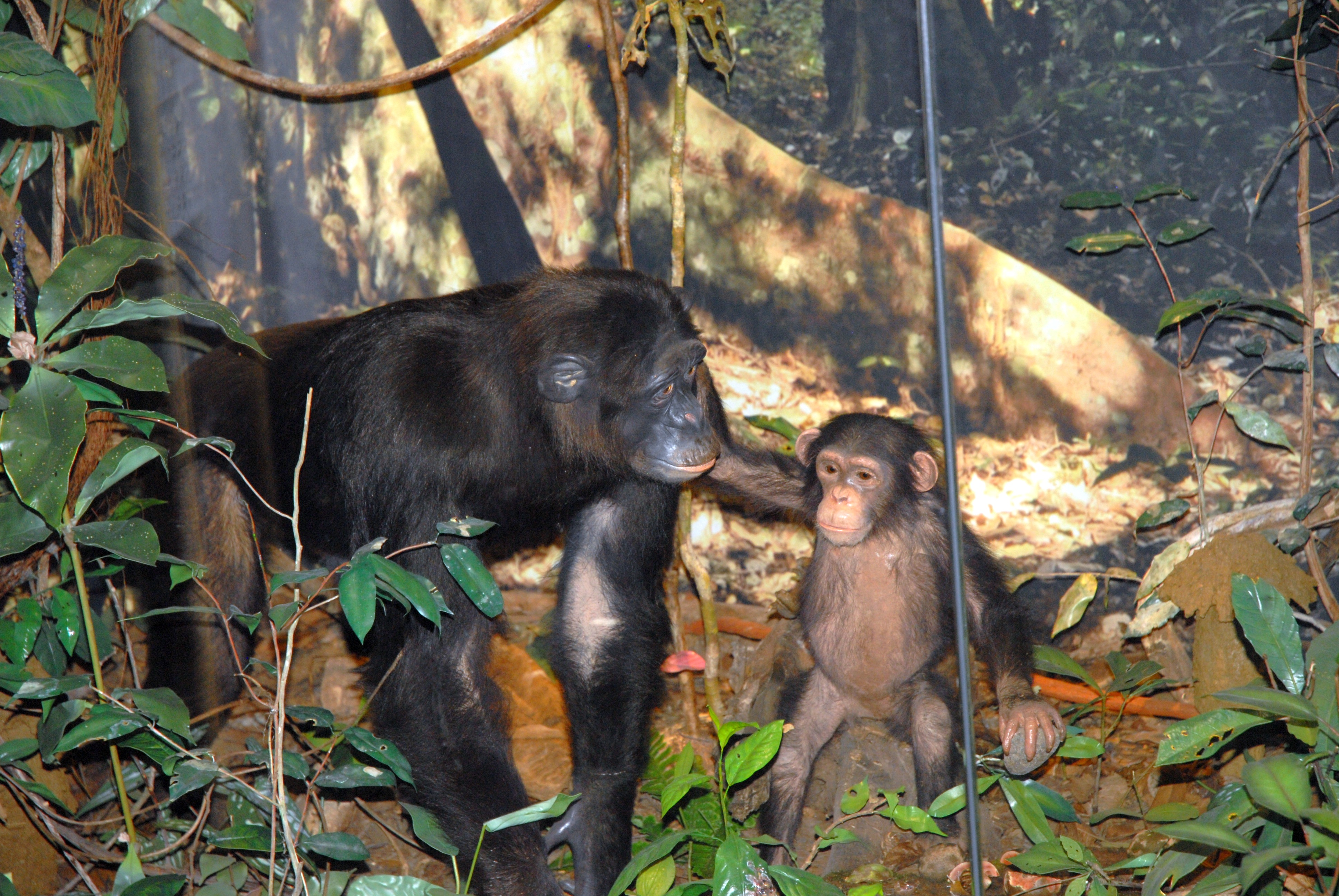 Die Lebensweise von Schimpansen, ihre Bedrohung und die Möglichkeiten der Beobachtung im Freiland werden in der Ausstellung angesprochen.